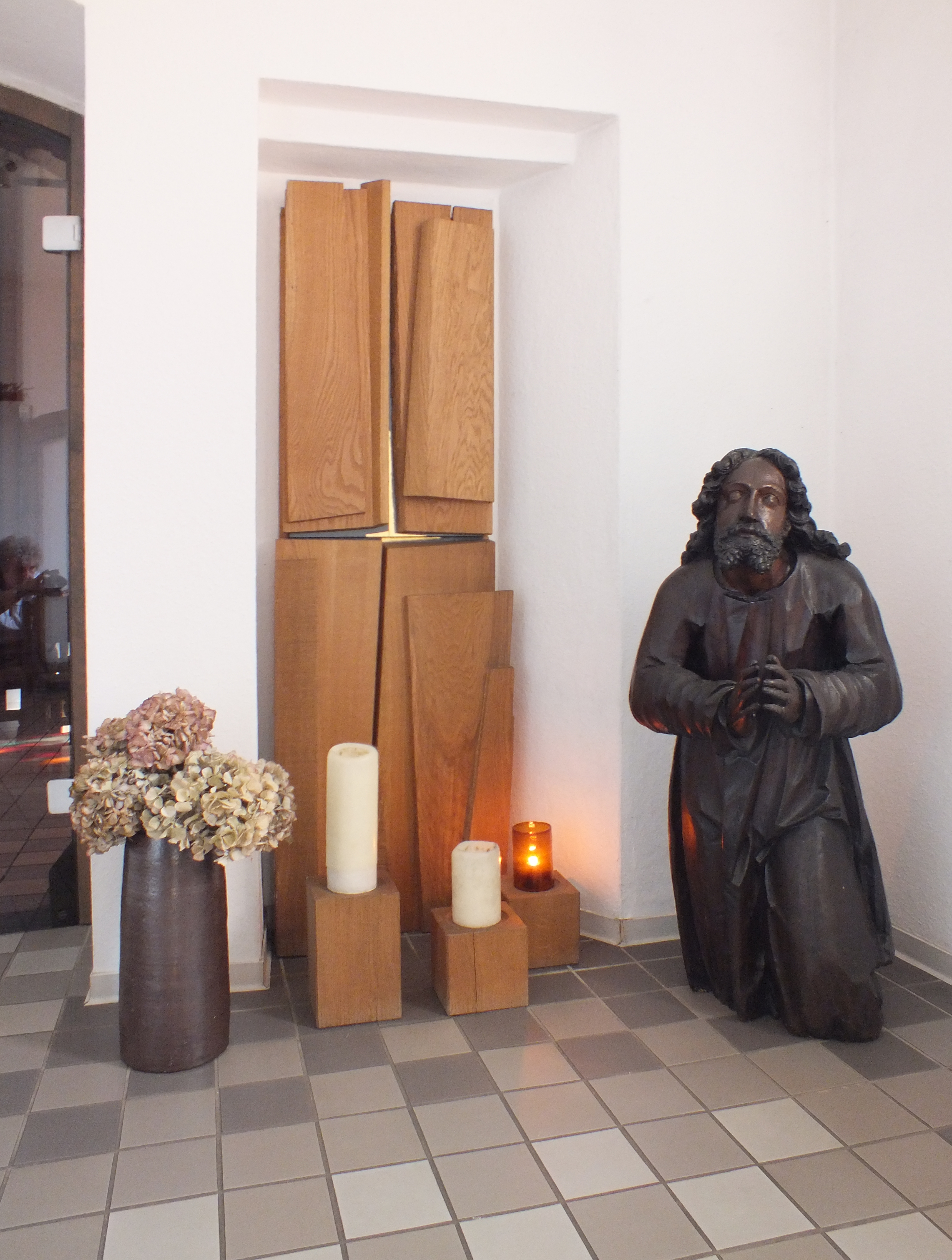 Berlin-Köpenick, Lindenstraße: Kathol. Kirche St. Josef; Andachtsraum mit St. Josef und Tabernakel